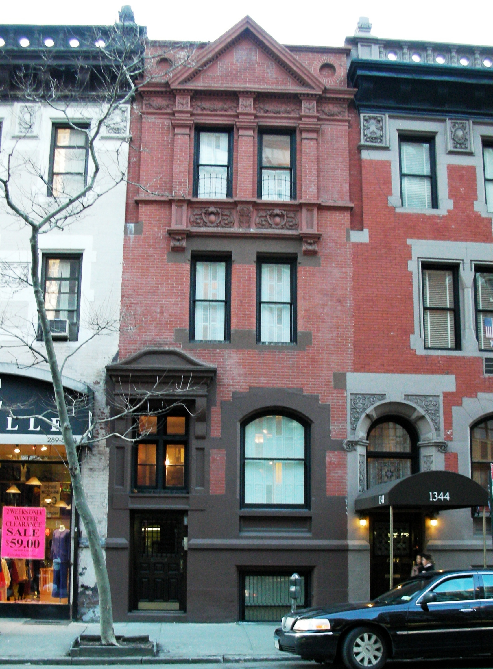 1342 della Lexington Avenue. Febbraio 2007. Fotografia di Giuseppe Mastromatteo